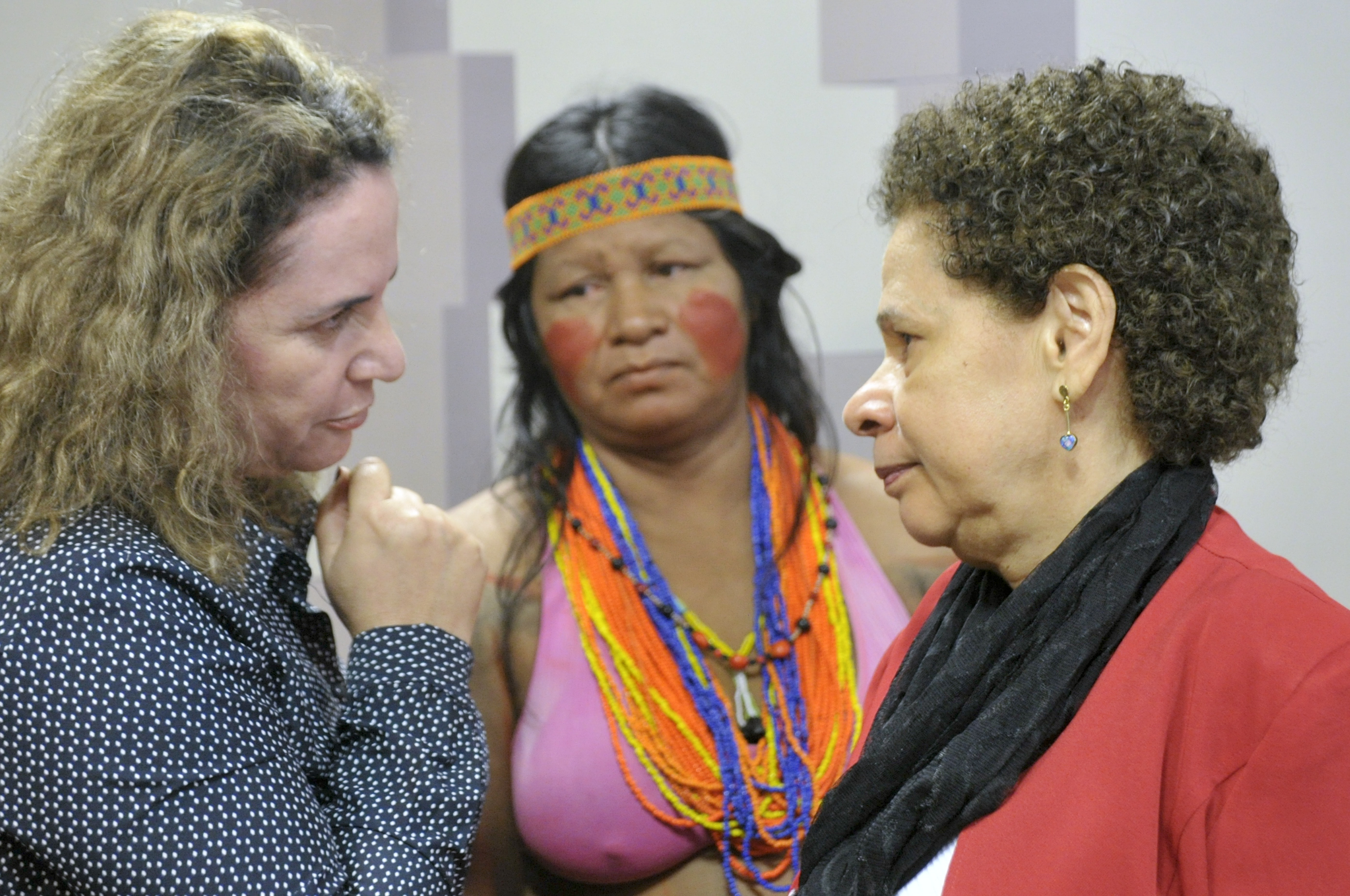 Comissão de Direitos Humanos e Legislação Participativa (CDH) realiza audiência pública interativa para debater sobre o "Plano de Desenvolvimento Agropecuário - PDA-MATOPIBA, instituído pelo Decreto Presidencial nº 8.447 de 6 de maio de 2015", com a participação de lideranças da região. Participam: representante da Liderança Indígena do povo Krahô, Gecílha Crukoy Krahô; presidente eventual da CDH, senadora Regina Sousa (PT-PI) Foto: Geraldo Magela/Agência Senado